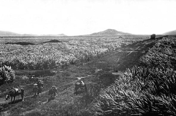 Plantaciones de caña de azúcar en la Hacienda Larco, La Libertad, Perú, principios del siglo XX